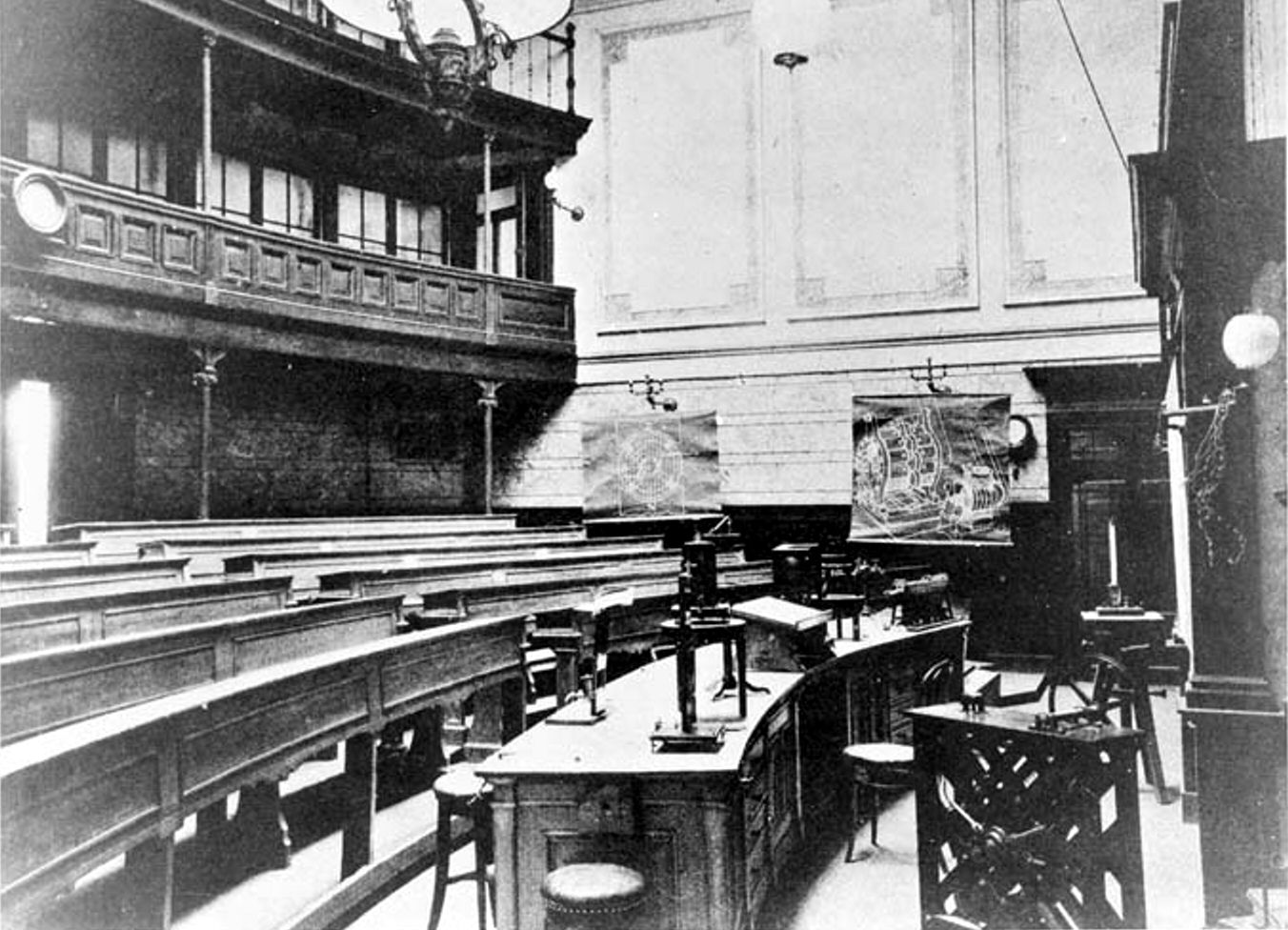 Collegezaal in gebouw Toegepaste Natuurkunde en Electrotechniek van Polytechnische School te Delft, 1895